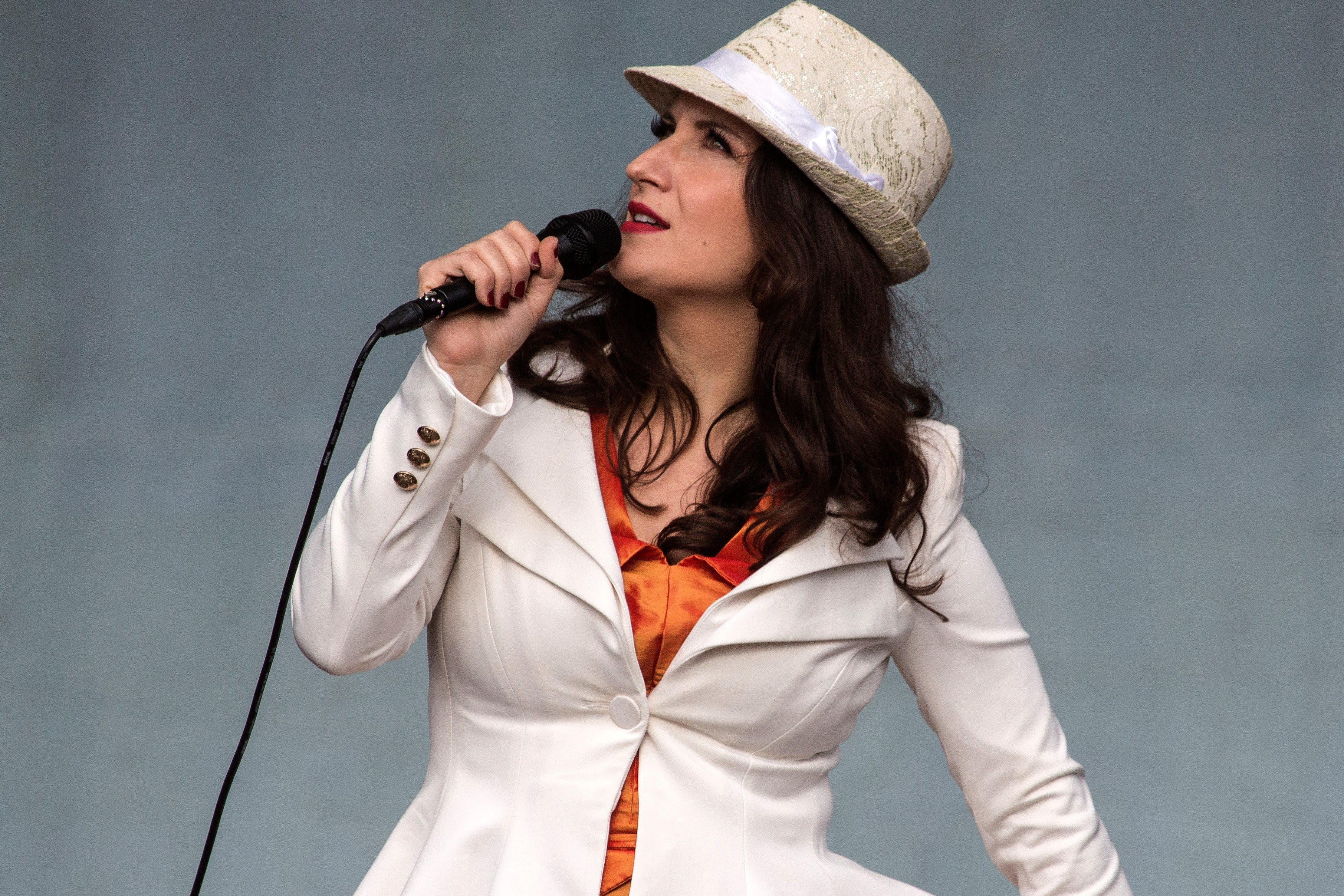 Sefora Nelson, August 2015, Landesgartenschau Oelsnitz/Erzgeb.